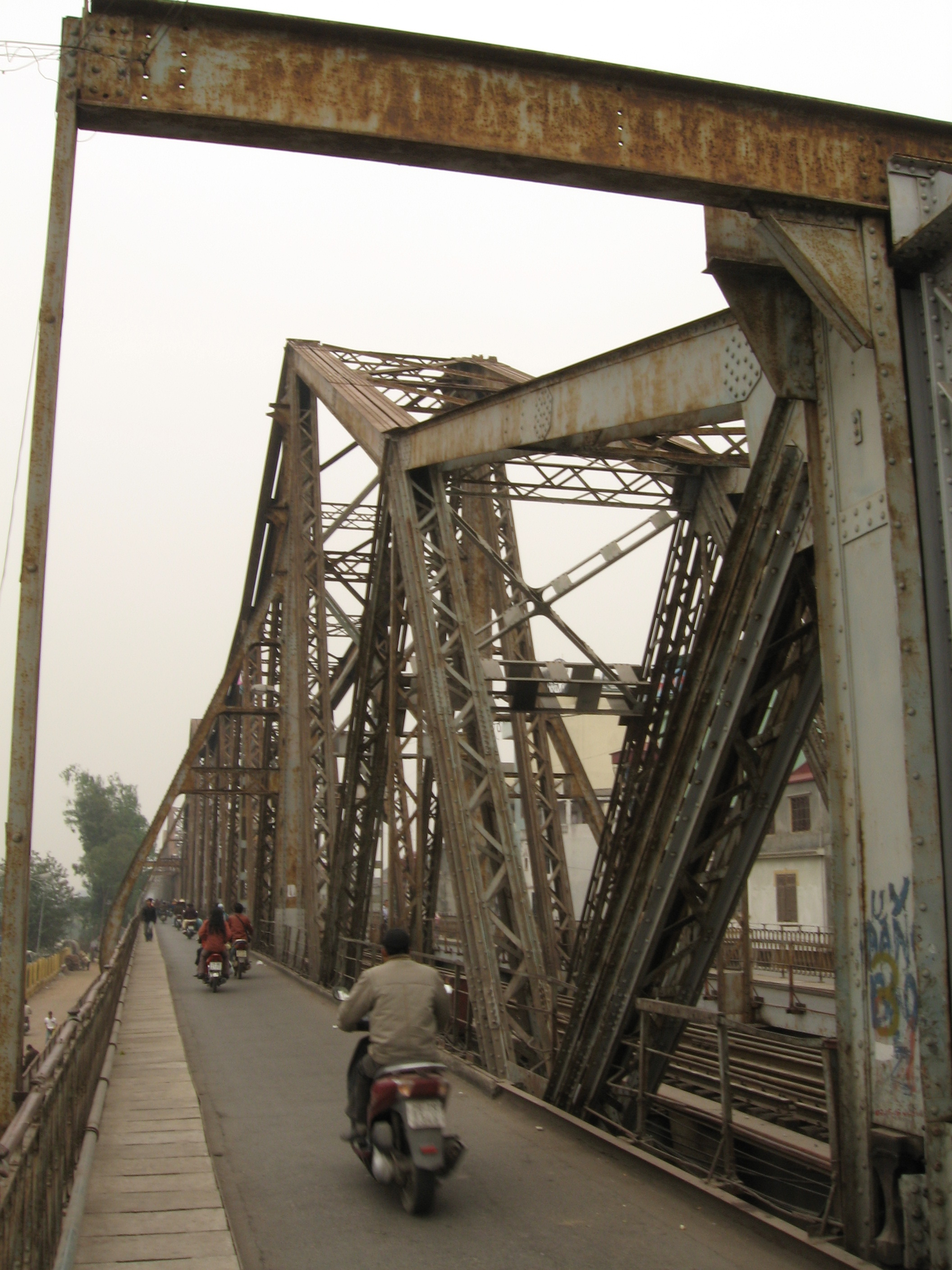 Long Biên brige, Hanoi, Vietnam